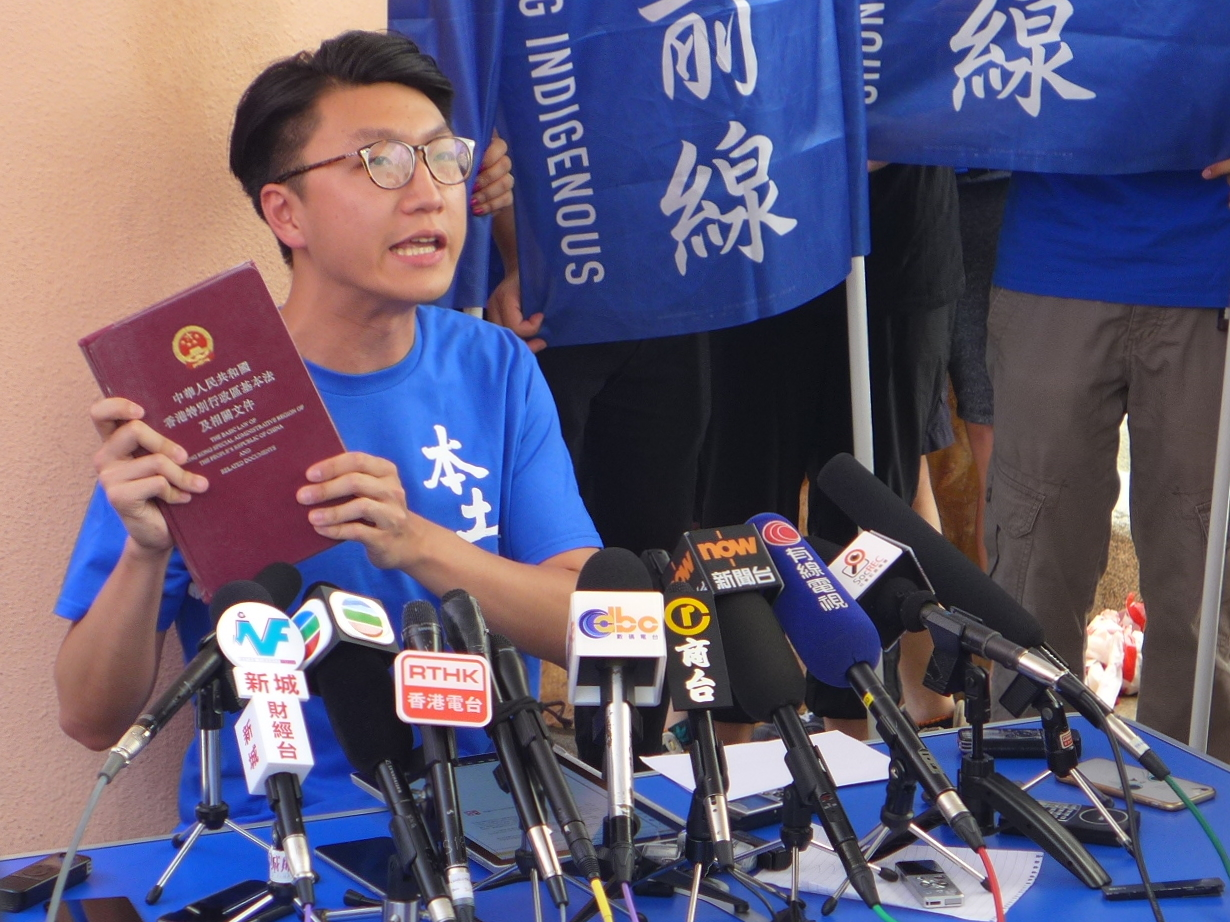 Edward Leung Tin-kei